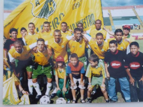 Debut de Freddy Guarin en Atletico Huila